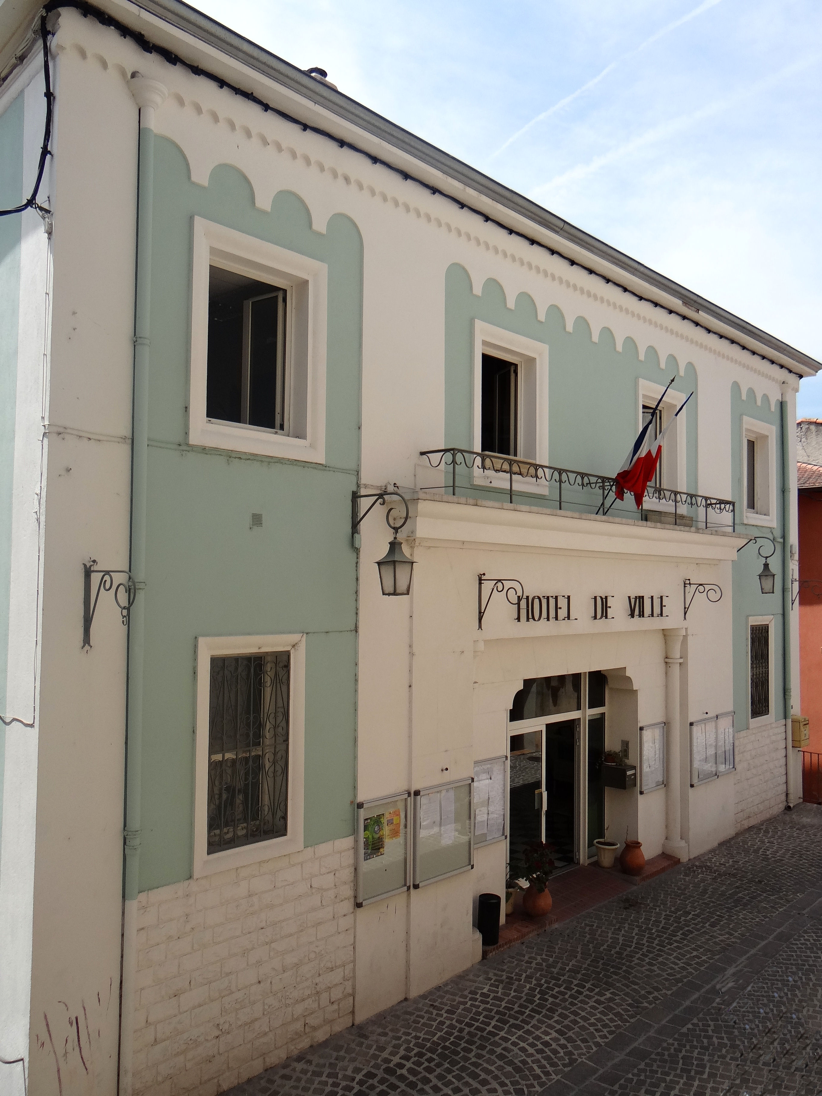 Contes (Alpes-Maritimes) - Hôtel de ville